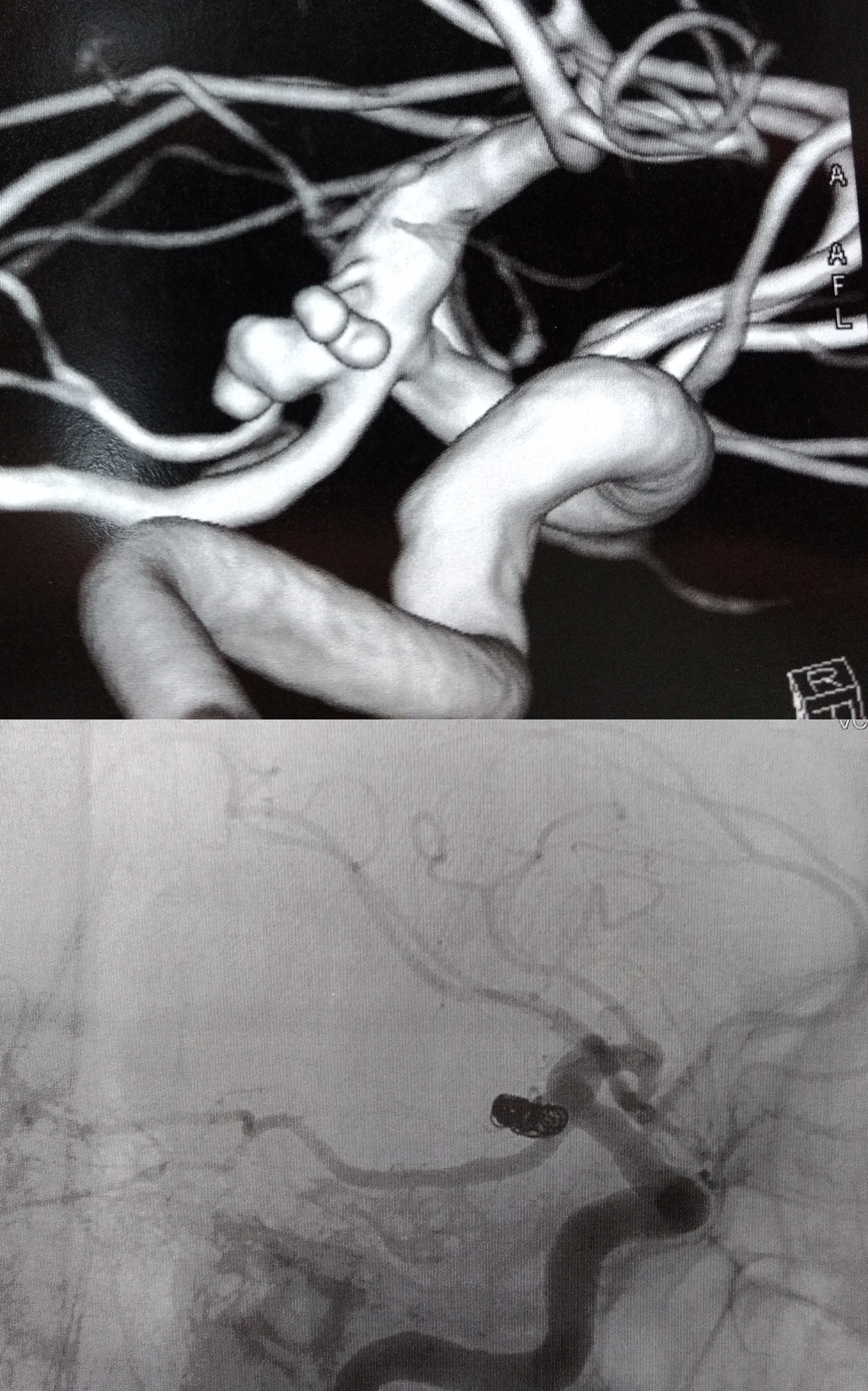 Embolizacao deAneurisma Cerebral